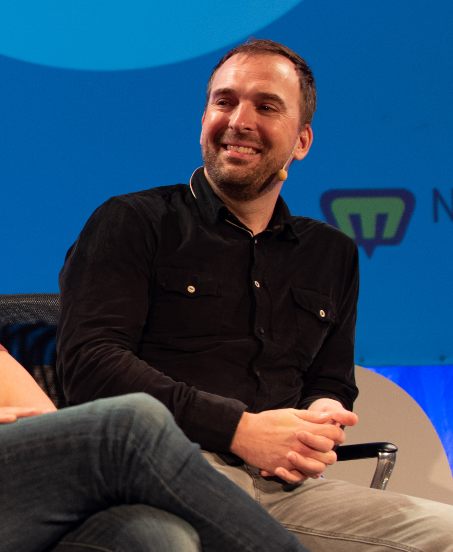 Vikingane - Tospråklig humorsuksess. Ragna Nordenborg, Jon Iver Helgaker og Jonas Torgersen.